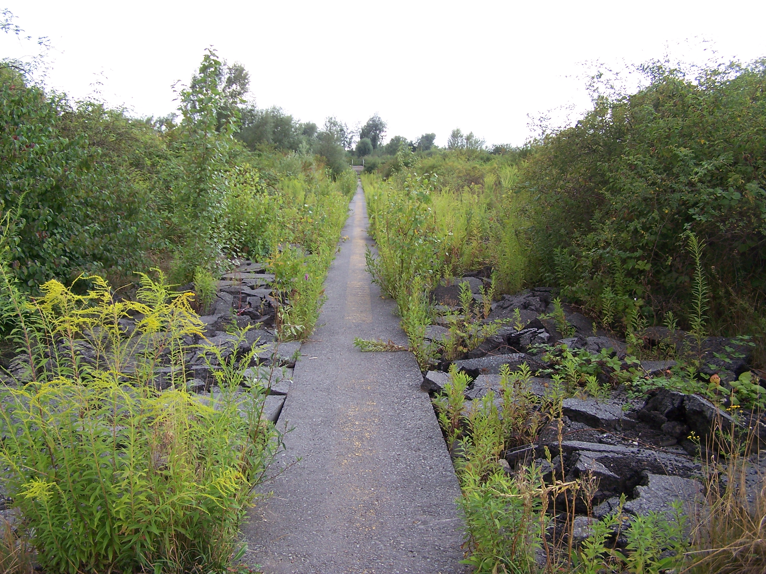 Renaturierung der ehemaligen Landebahn am Flugplatz Bonames